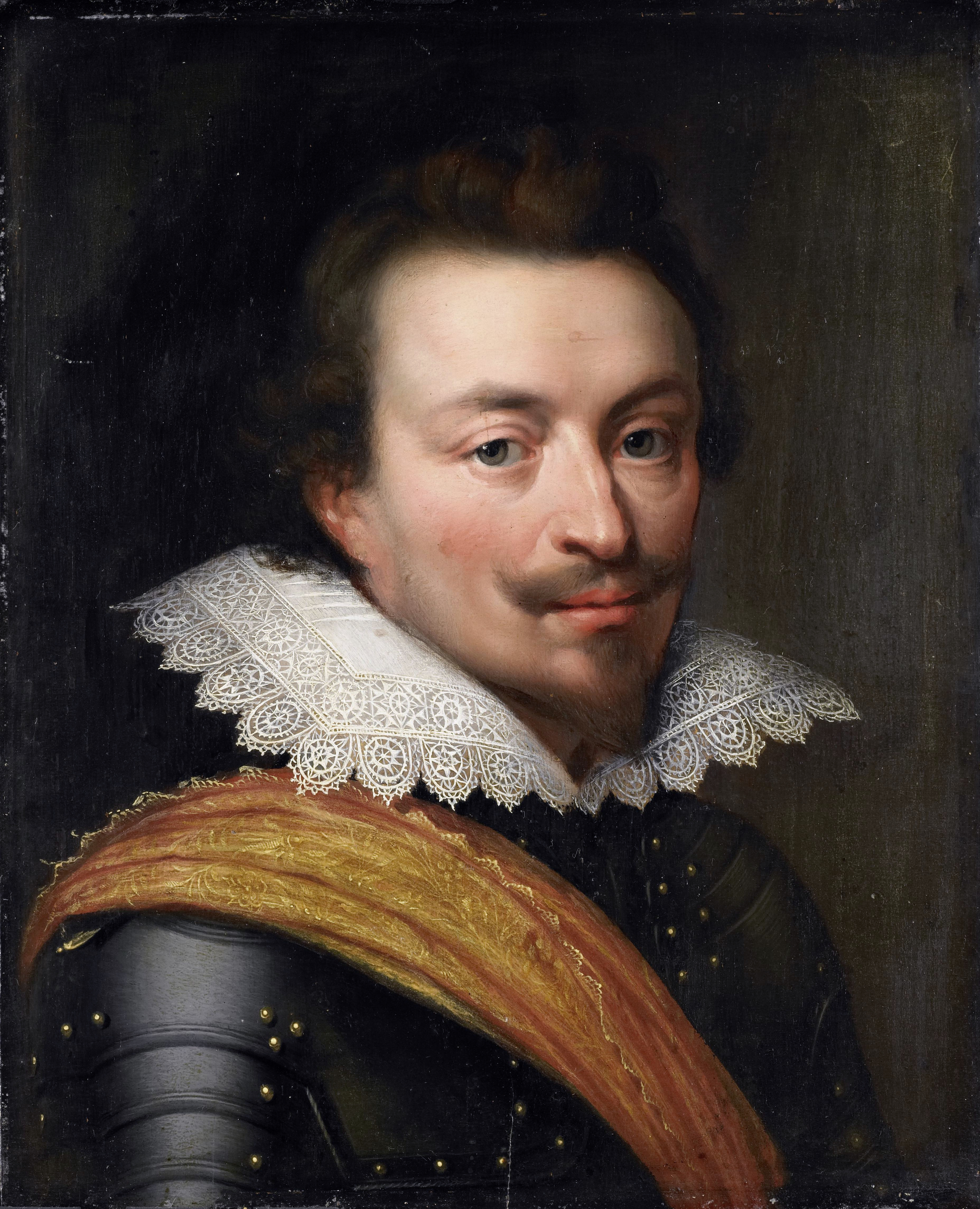 Part of the Katzenelnbogen Series